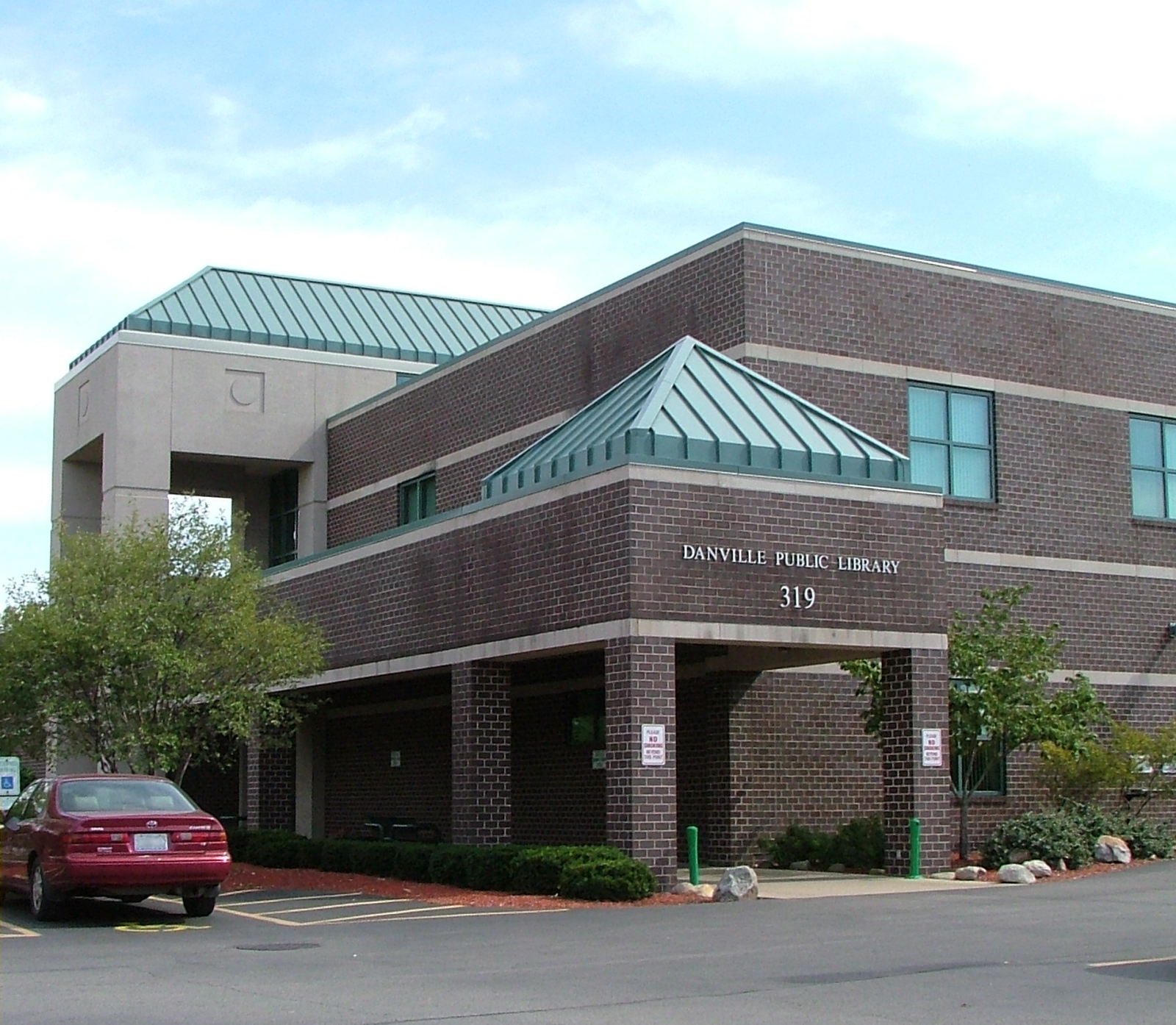 Danville Public Library in Danville, Illinois